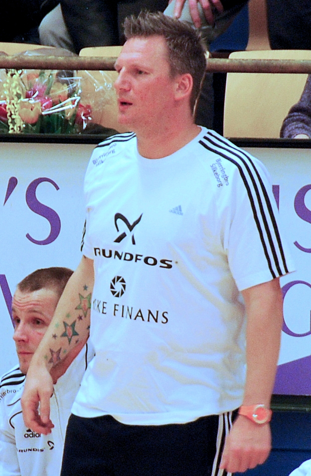 Håndboldspiller og træner Nikolaj Jacobsen.